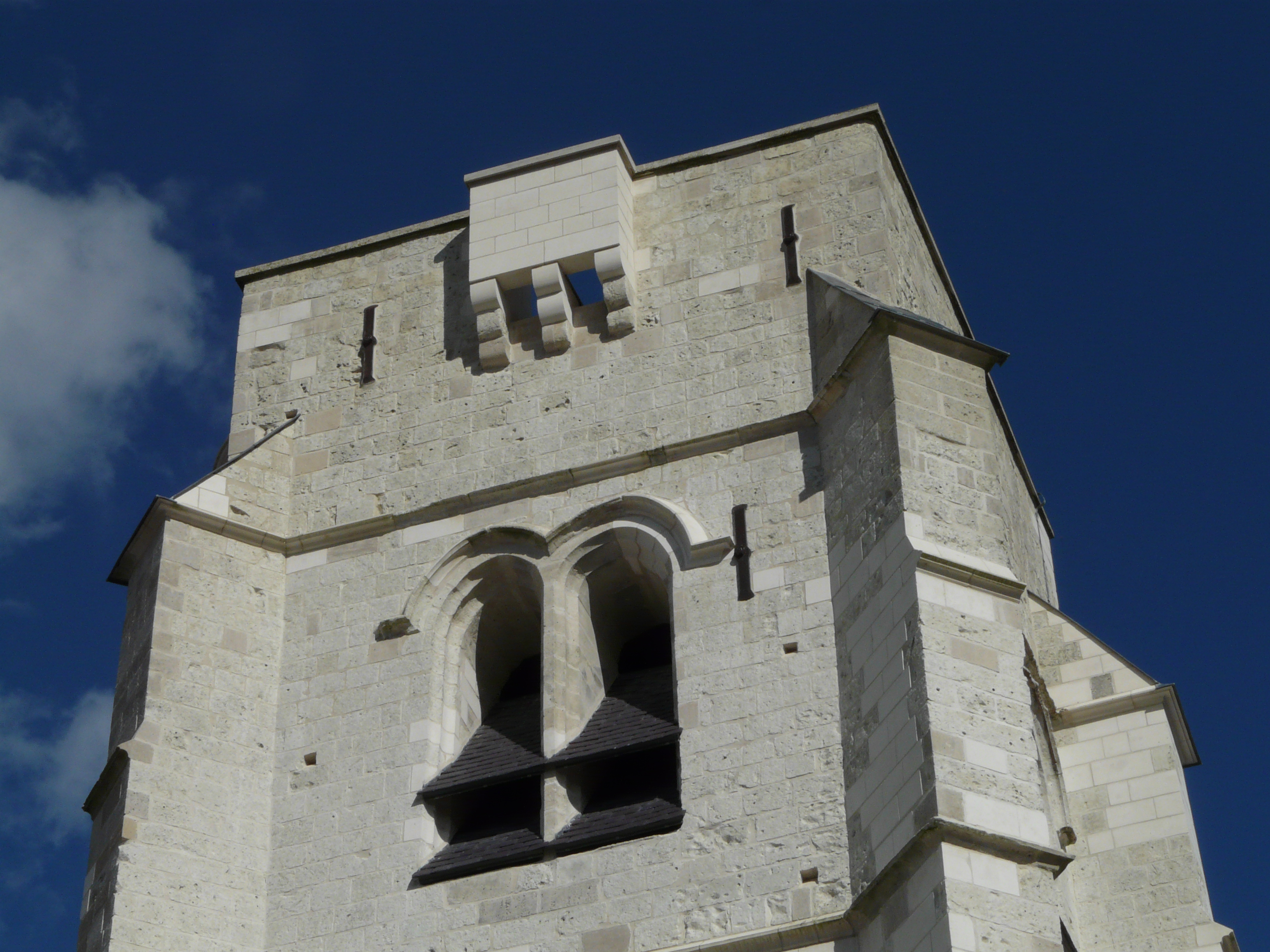 Le clocher de l'église après sa restauration, septembre 2012